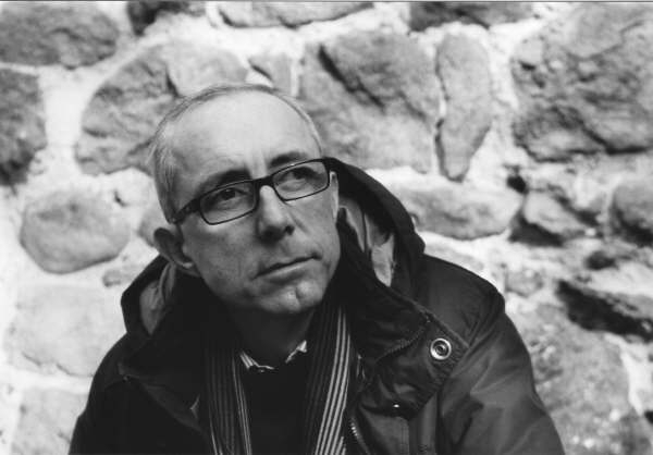 foto di Alessandro Tamburini